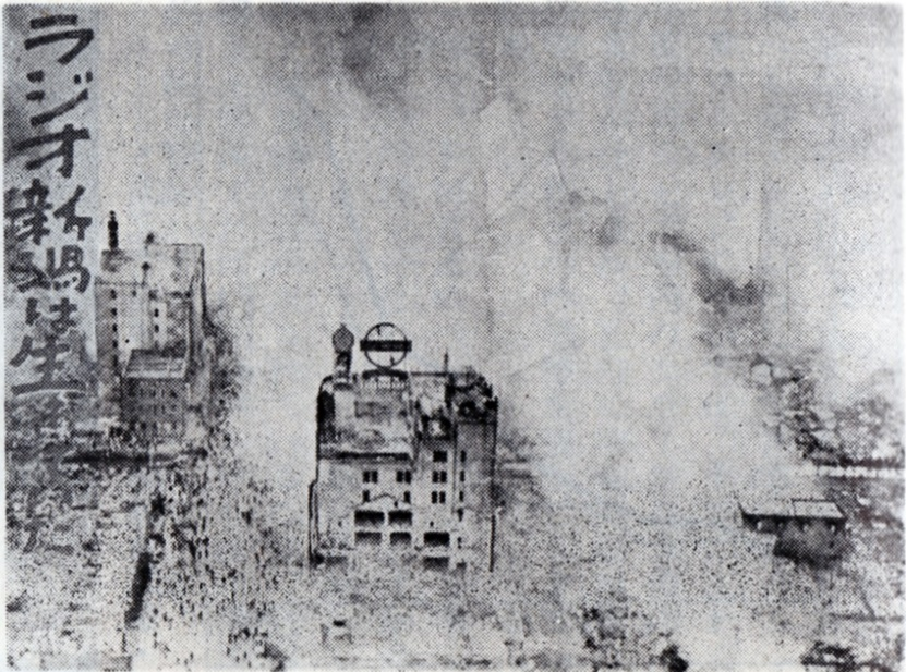 1955年の新潟大火で全焼したラジオ新潟（現在のBSN新潟放送）社屋（大和デパート屋上）。その直後に民放連が発刊したパンフレットの表紙。『民間放送十年史』に引用。